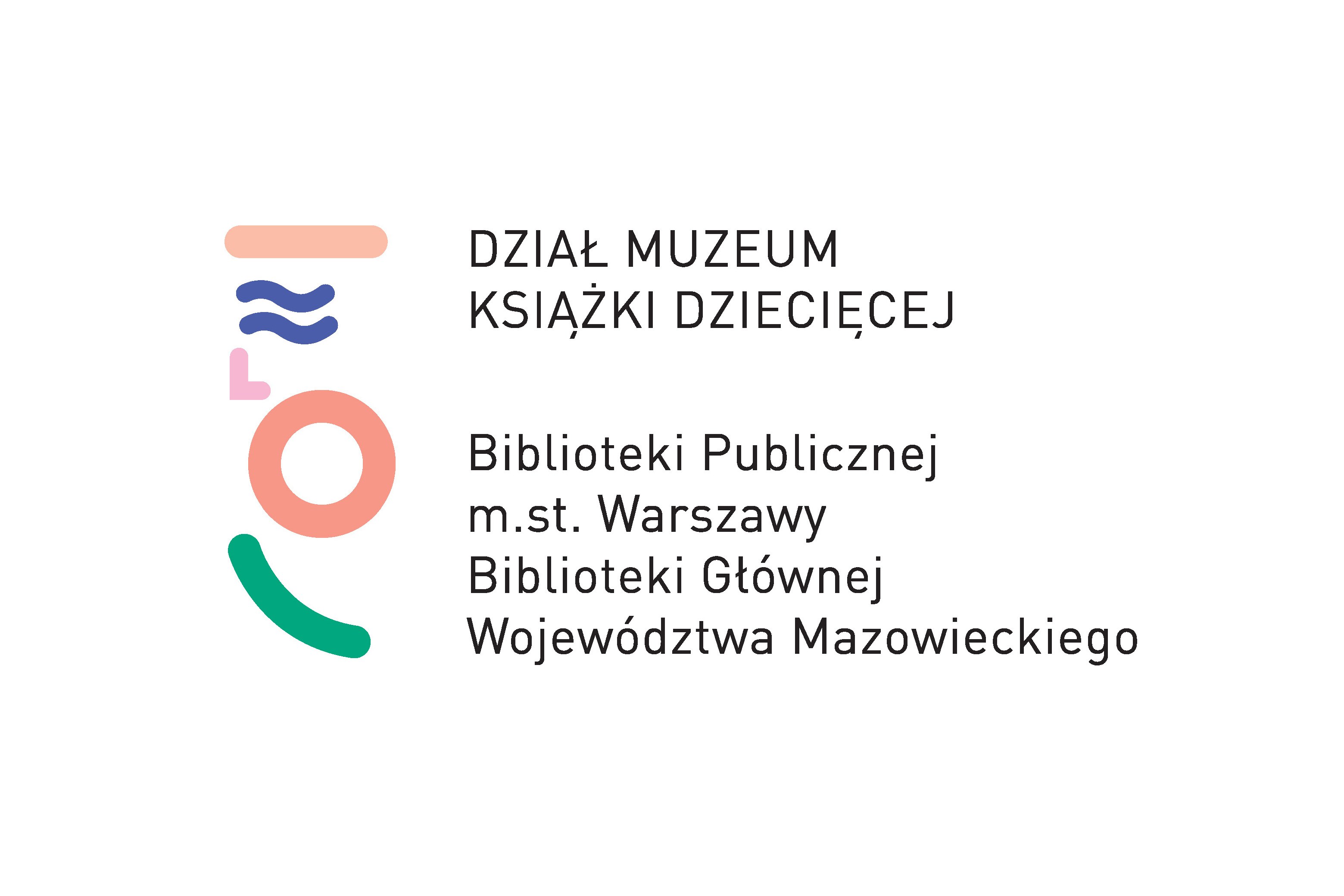 Logo Biblioteka Publiczna m.st. Warszawy używane przez Muzeum Książki Dziecięcej